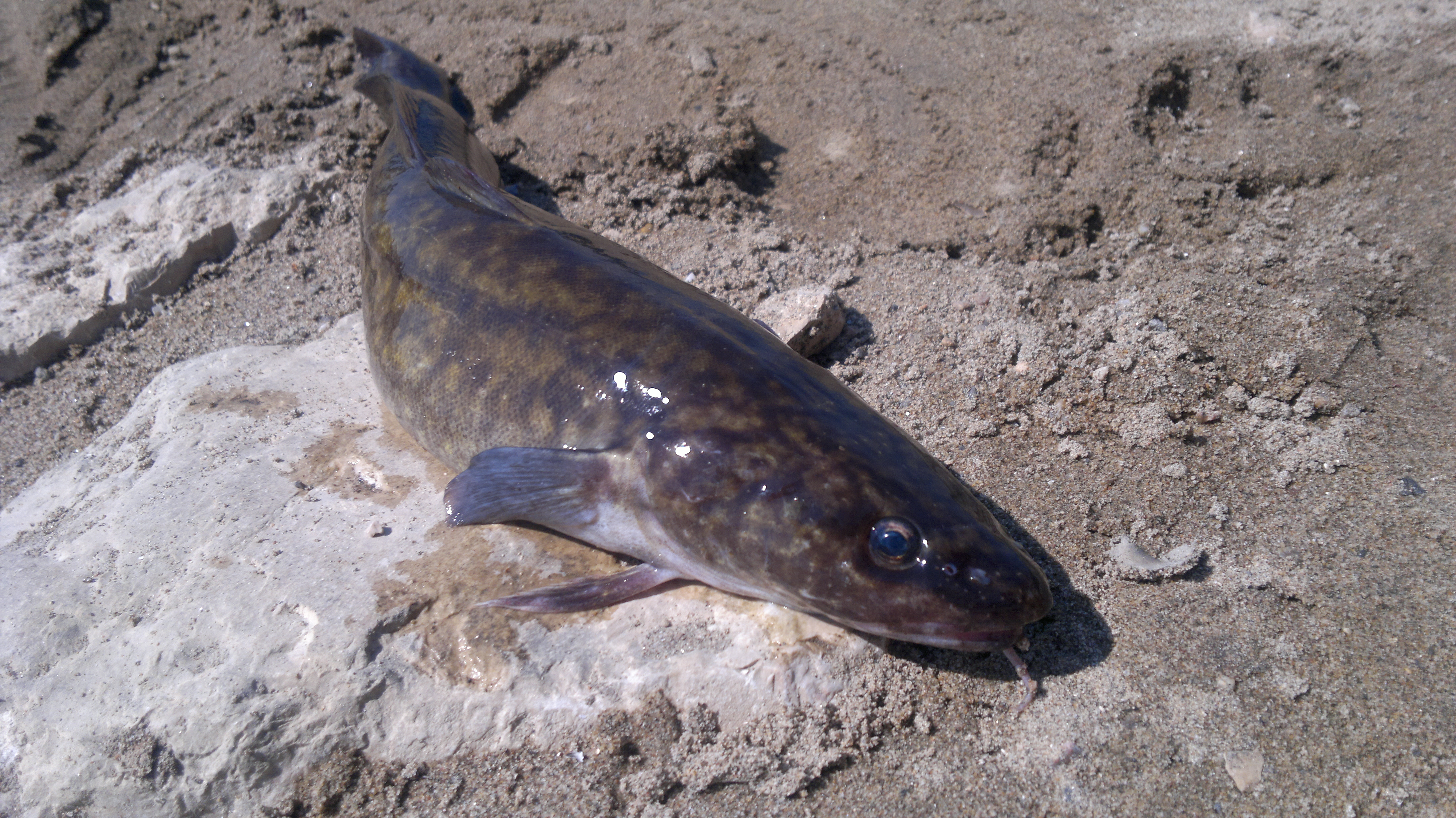 Lota lota